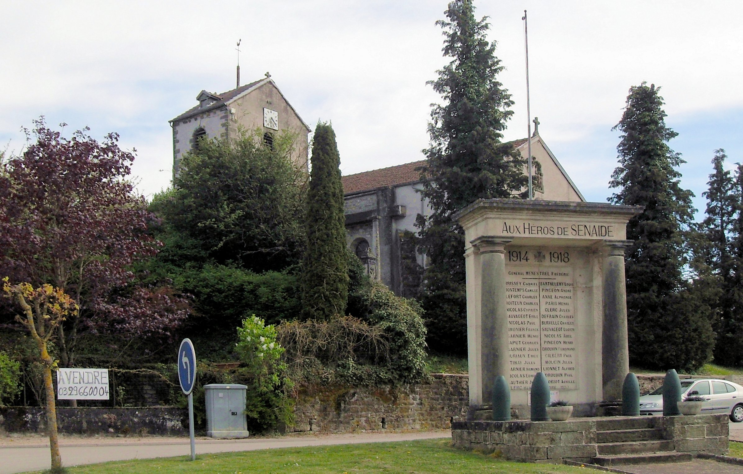 L'église Saint-Vallier de Senaide